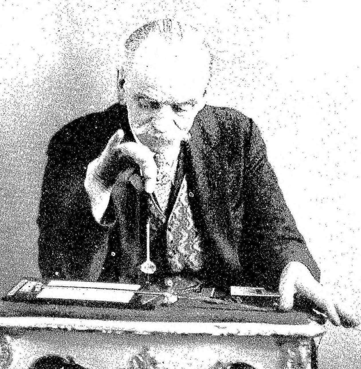 Démonstration de "polarisation humaine" par M. A. Bovis, radiesthésiste.